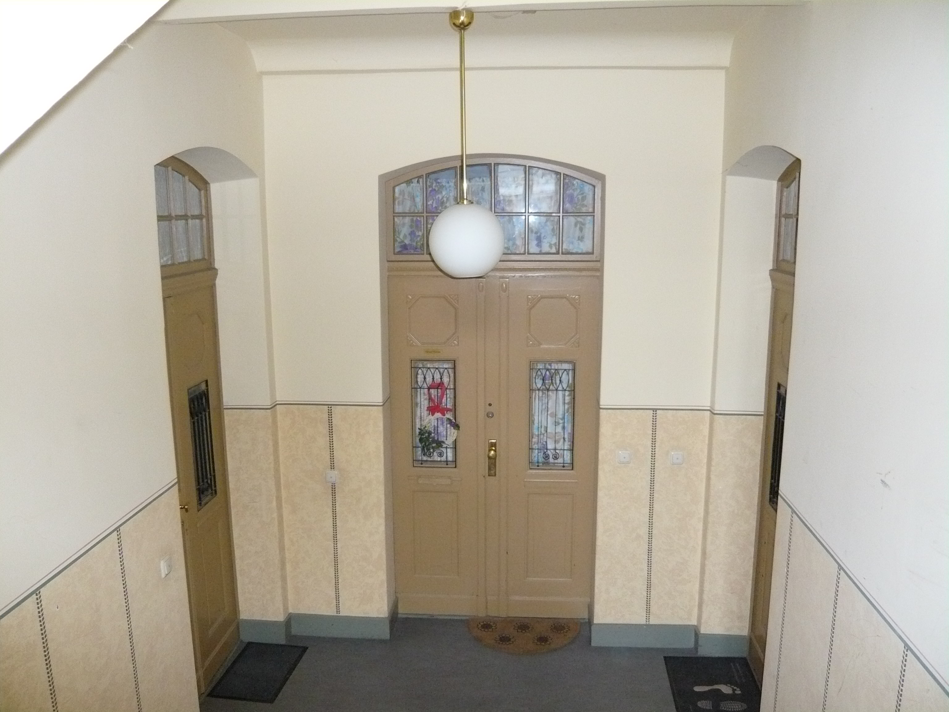 Ein Aufgang der ersten Wohnzeile der Konsumgenossenschaft